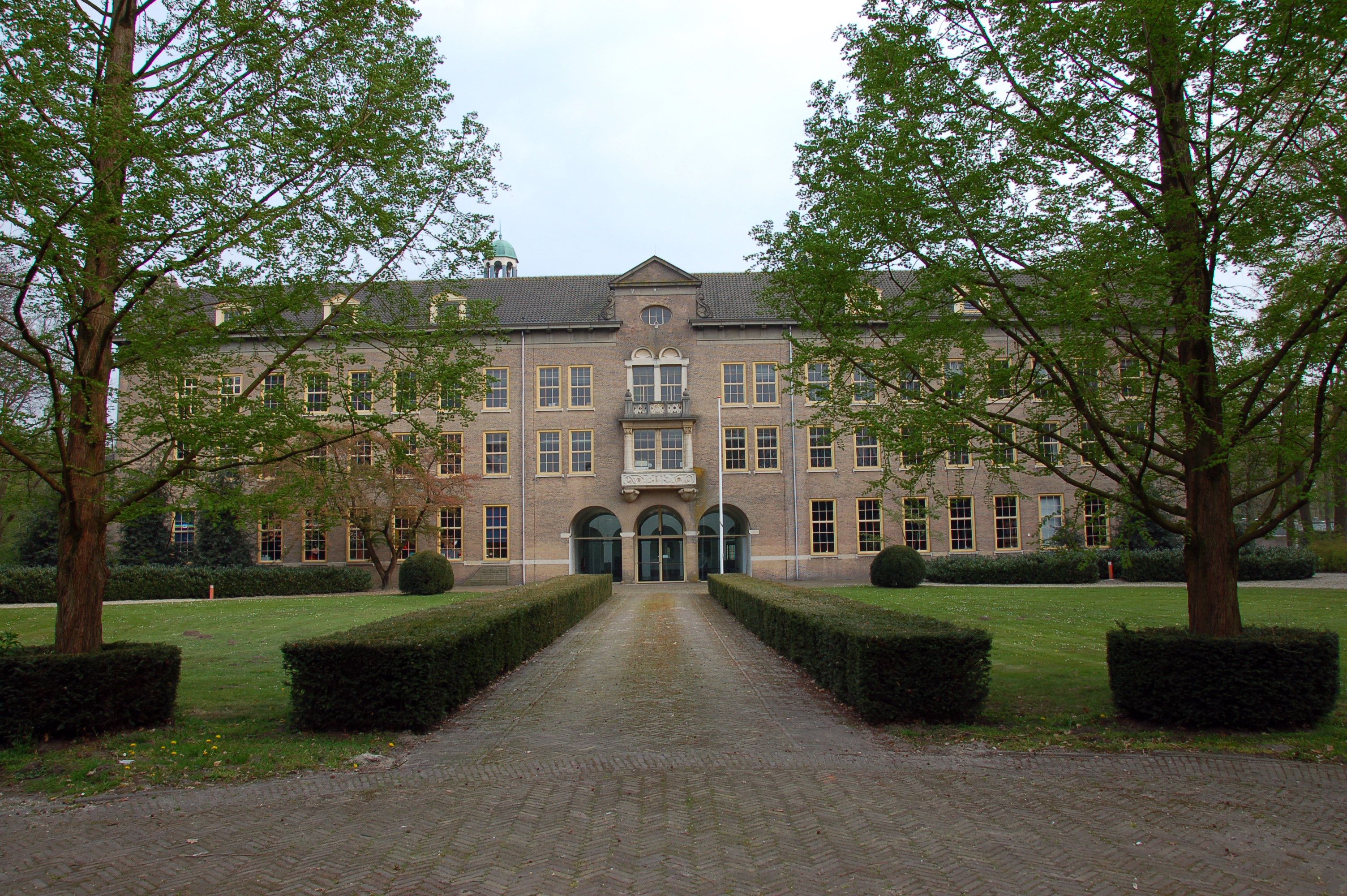 Breda, Niederlande, Sint Joost IJpelaar